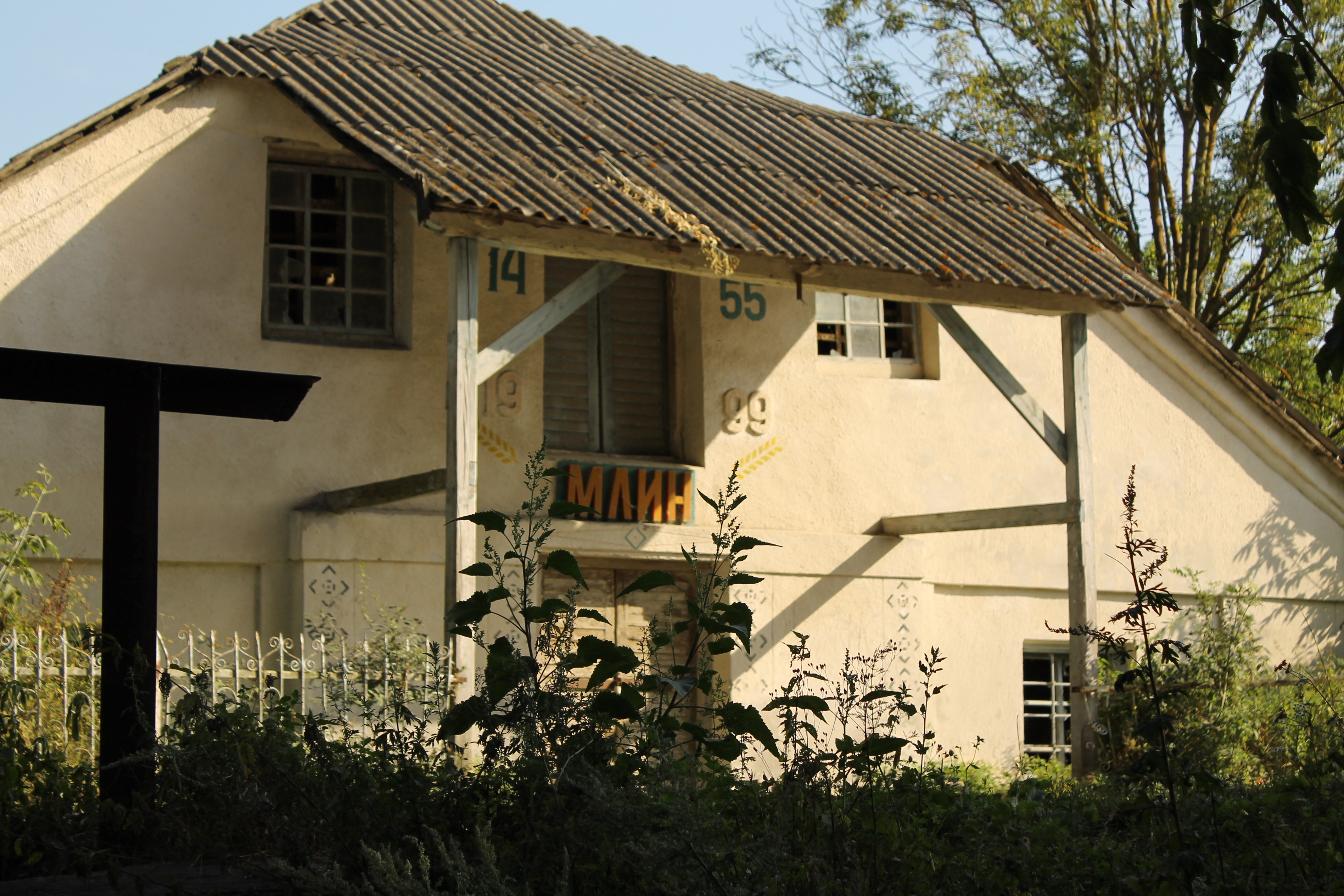 Млин, село Купин, 1455